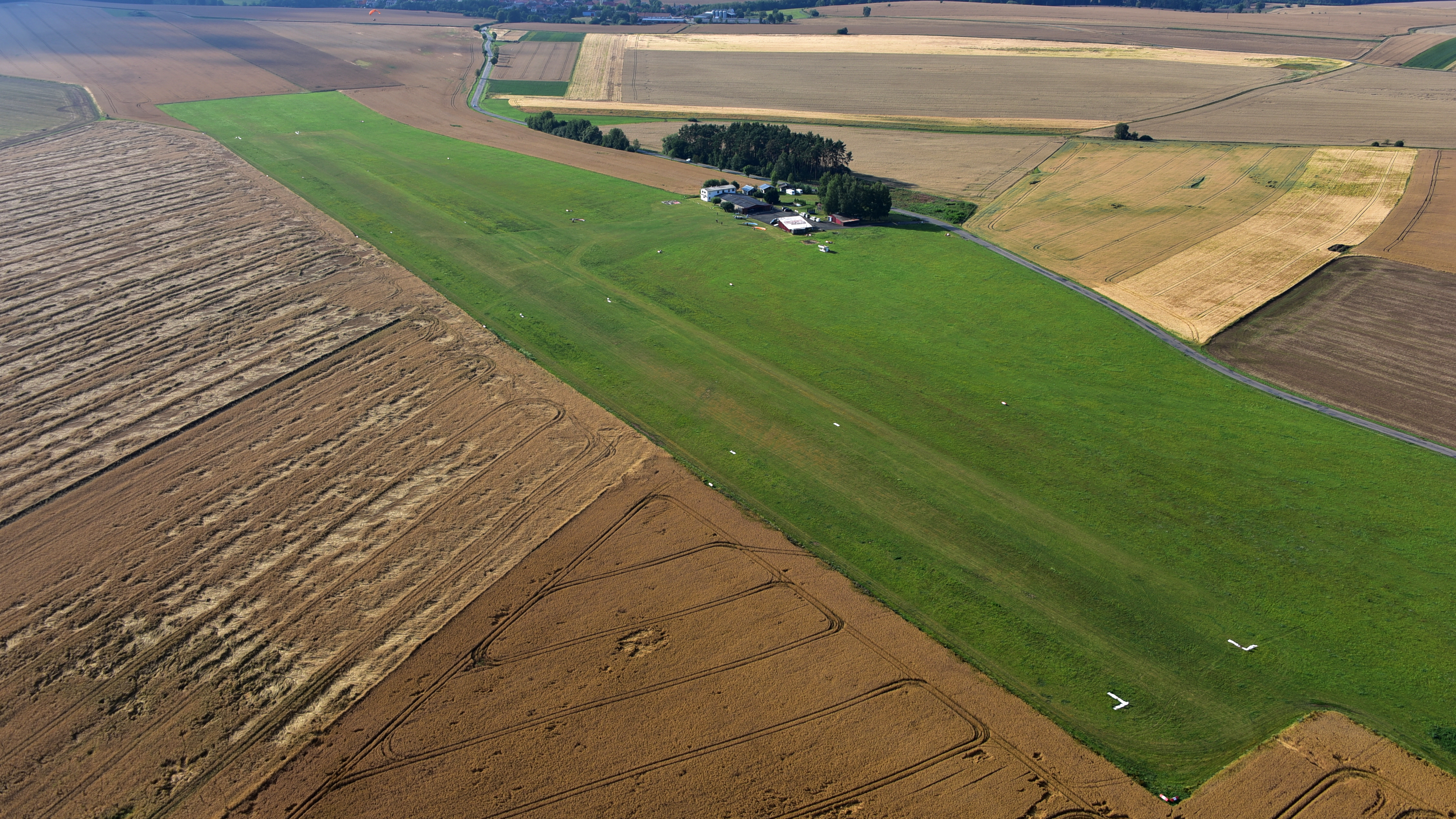 CZ - Vlašim, Flugplatz, Luftaufnahme (2018)